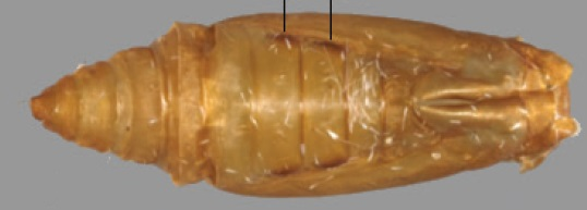 Leucinodes laisalis